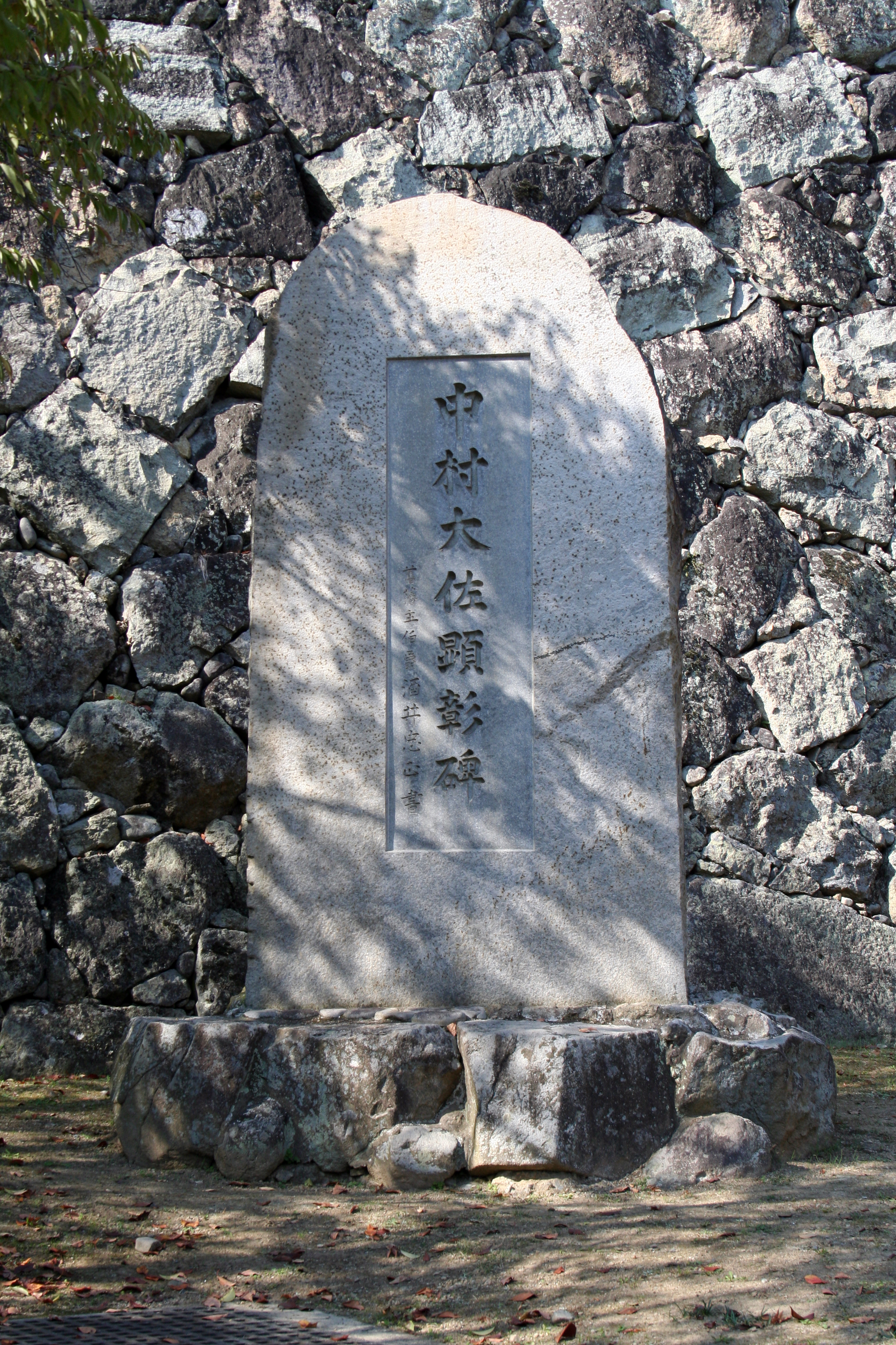 2009年秋の姫路城。 城内にある中村重遠大佐を記念した石碑。彼は姫路城保存運動の中心人物として活躍し、その功績によってここに記念碑が作られた。